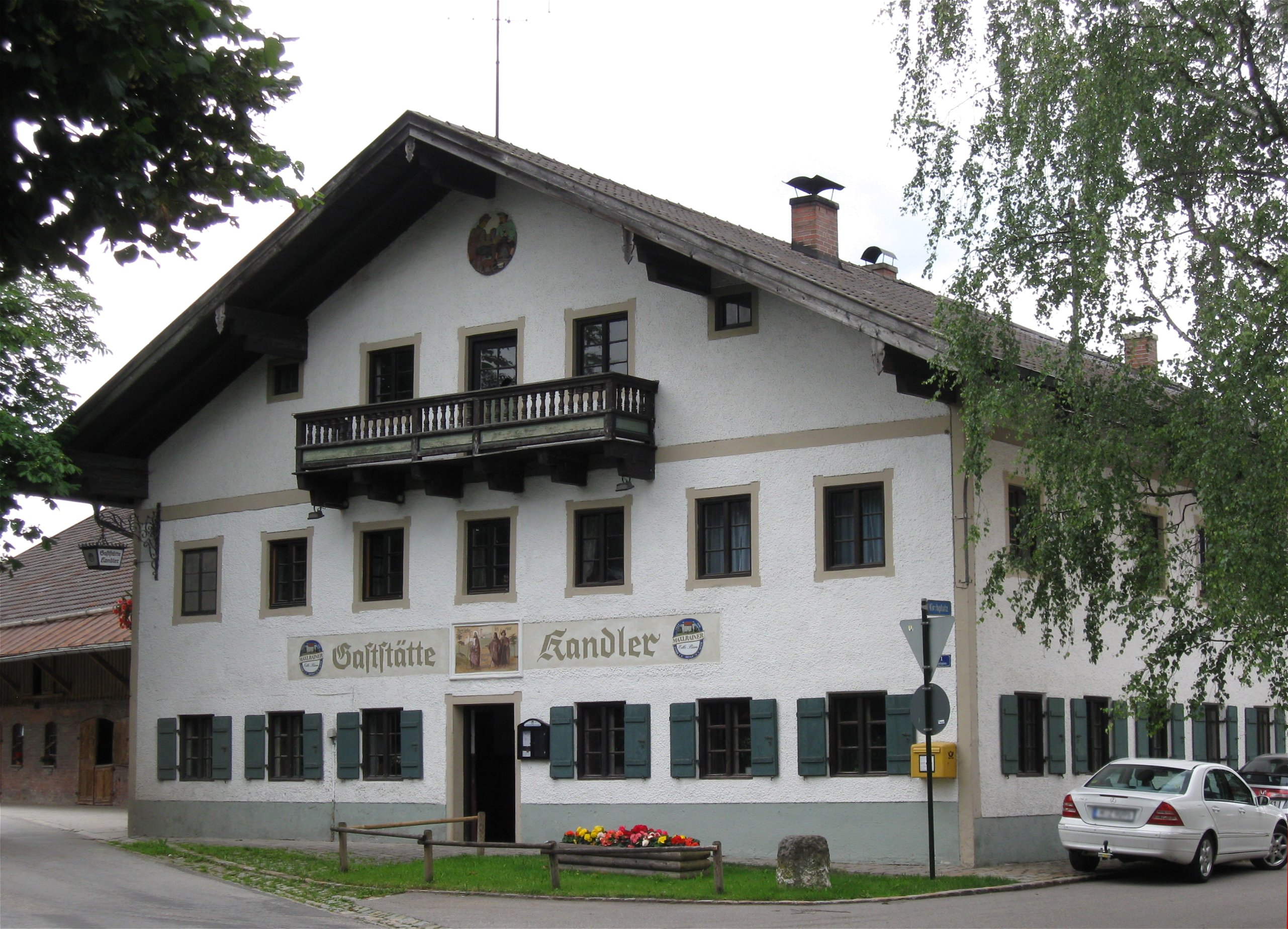 Oberbiberg: Kirchplatz 1; Gasthof, zweigeschossiger Satteldachbau mit Kniestock, Trauf- und Giebelschrot, Mitte 19. Jh., Kniestock und Dachveränderung, 1948; mit Ausstattung der Gaststätte, 1923; Stallstadel, zweigeschossiger Satteldachbau mit verschaltem Obergeschoss, 1909; Kegelbahn, eingeschossiger, hölzerner Satteldachbau, bez. 1905.